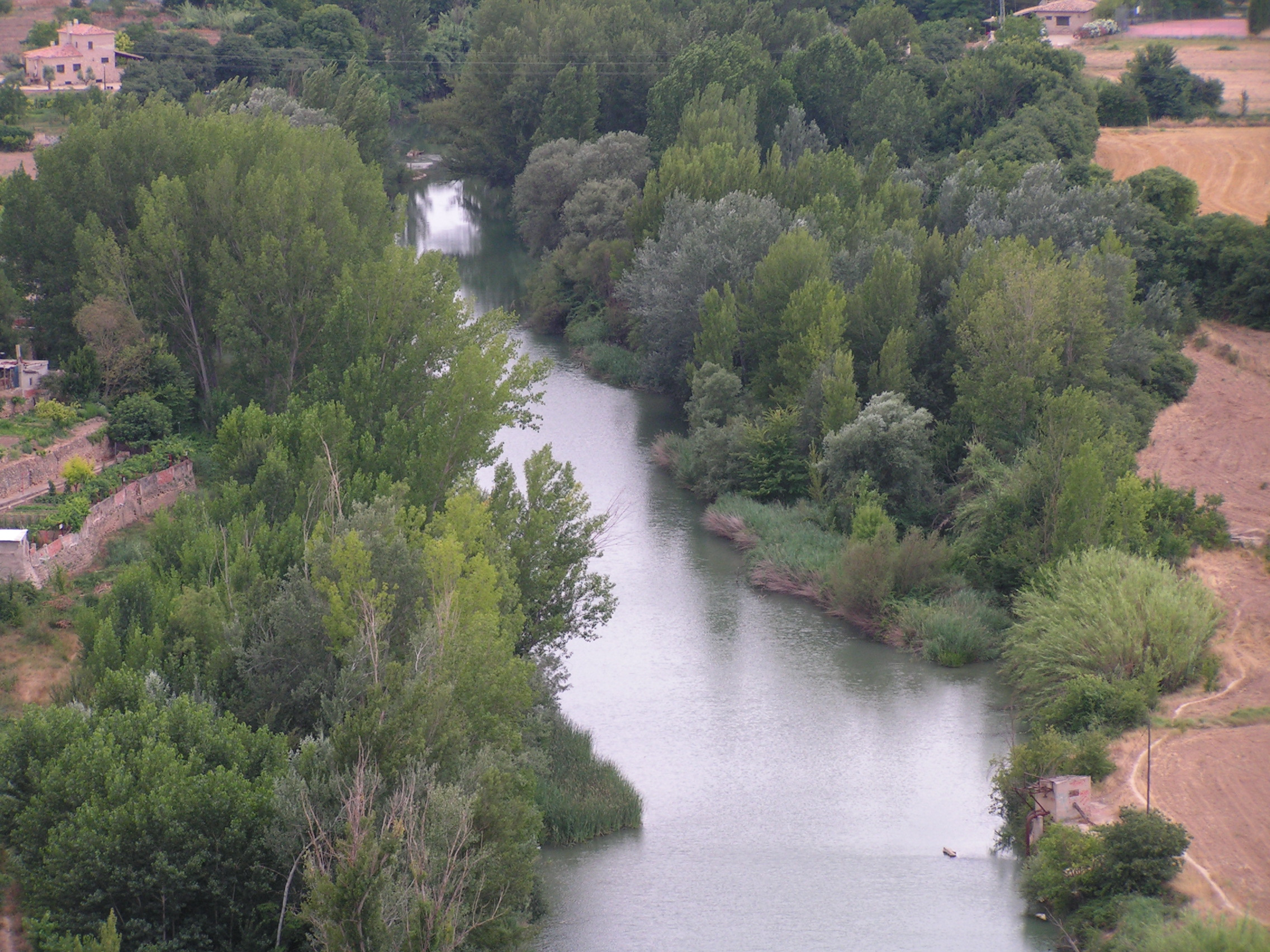 Río Guadalope en Alcañiz (Teruel)